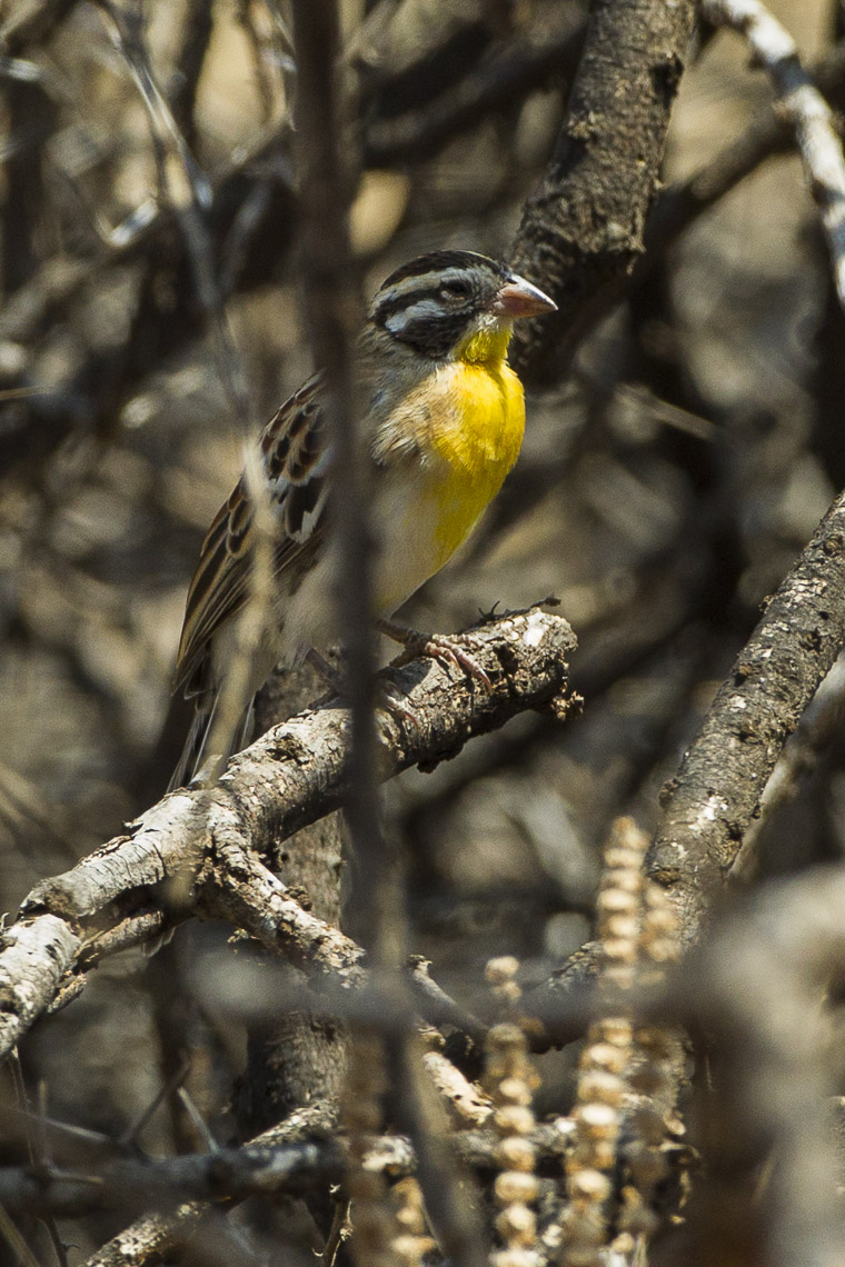 Somali Bunting - Kenya_S4E5022